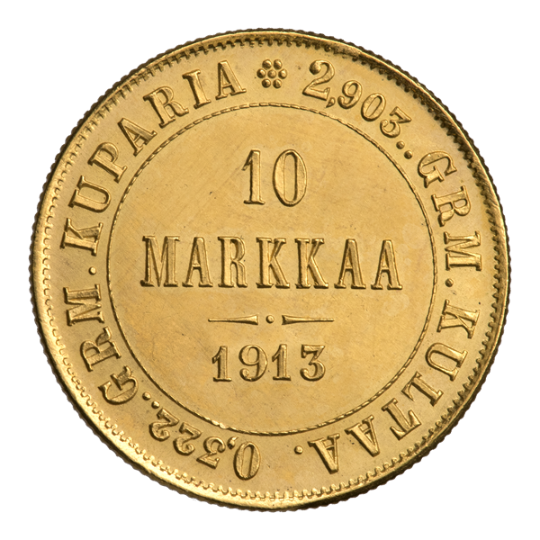 Десять марок Николая II 1913 г., монета для Финляндии, реверс. Внутри верёвочного ободка обозначение номинала: 10 MARKKAA; под фигурной чертой дата: 1913. Круговая надпись: 2,903 .. GRM. KULTAA. 0,322 .. GRM. KUPARIA *. Биткин 394